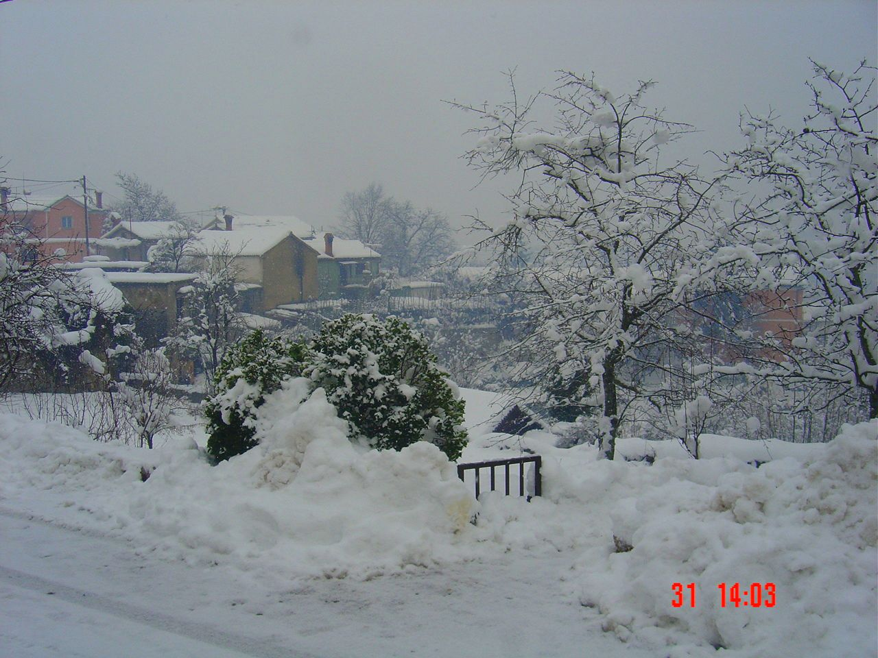 Veliki Brgud (blizu Mali Brgud)